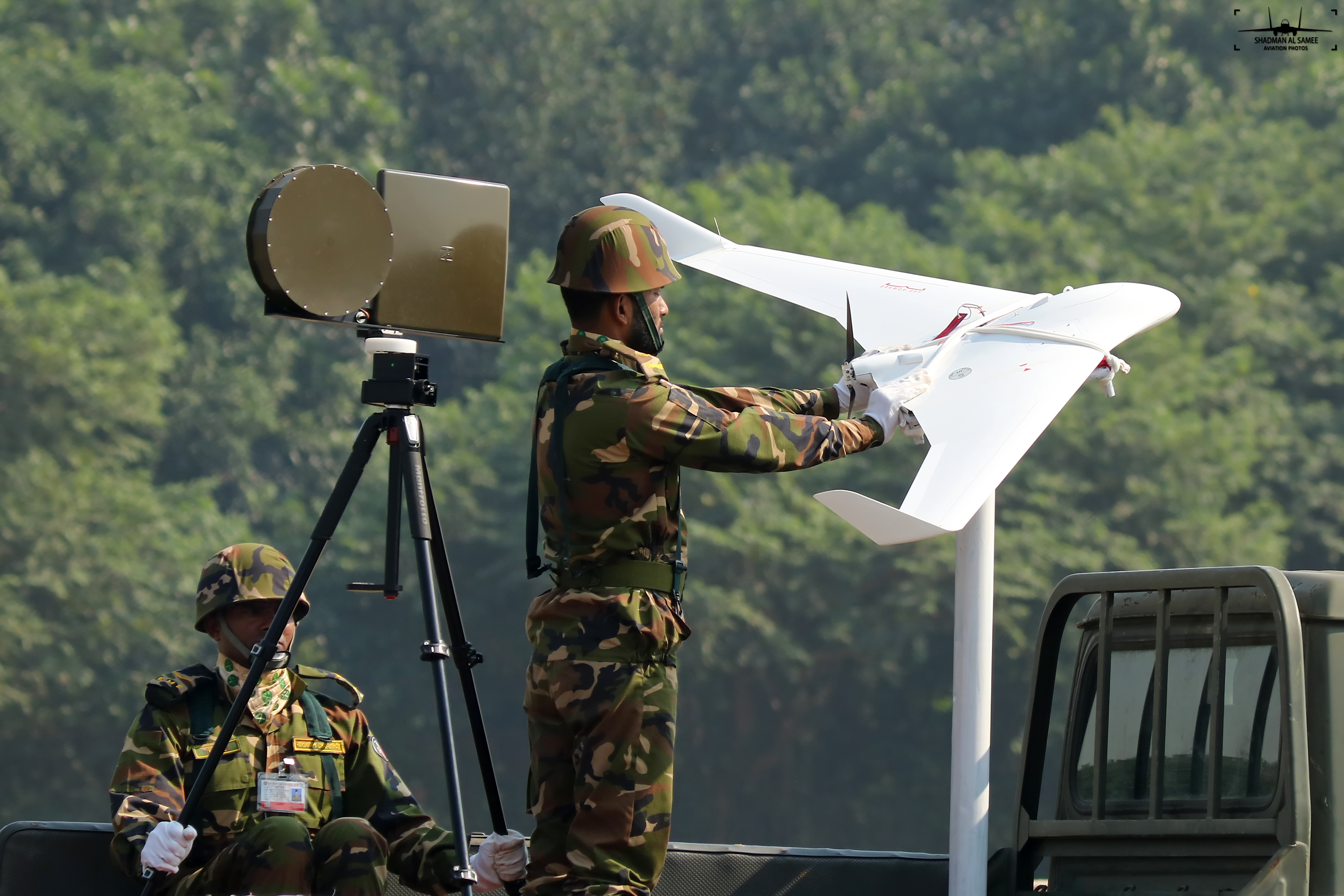 VGTJ/ VDP2017.